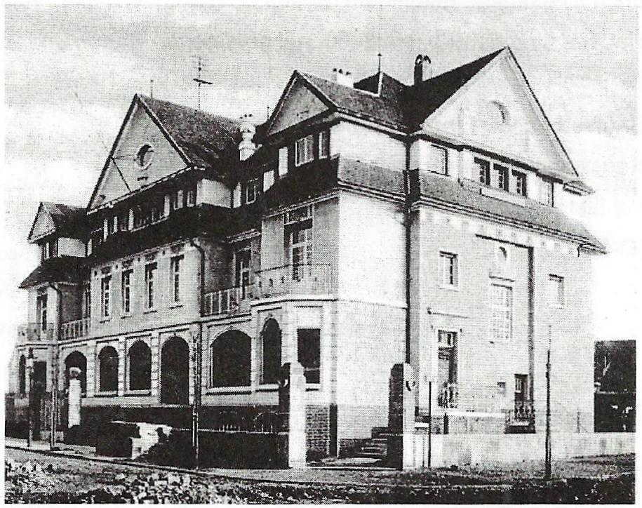 Kontorhaus der Firma Düren, Karl-Finkelnburg-Straße 49–53, Bad Godesberg